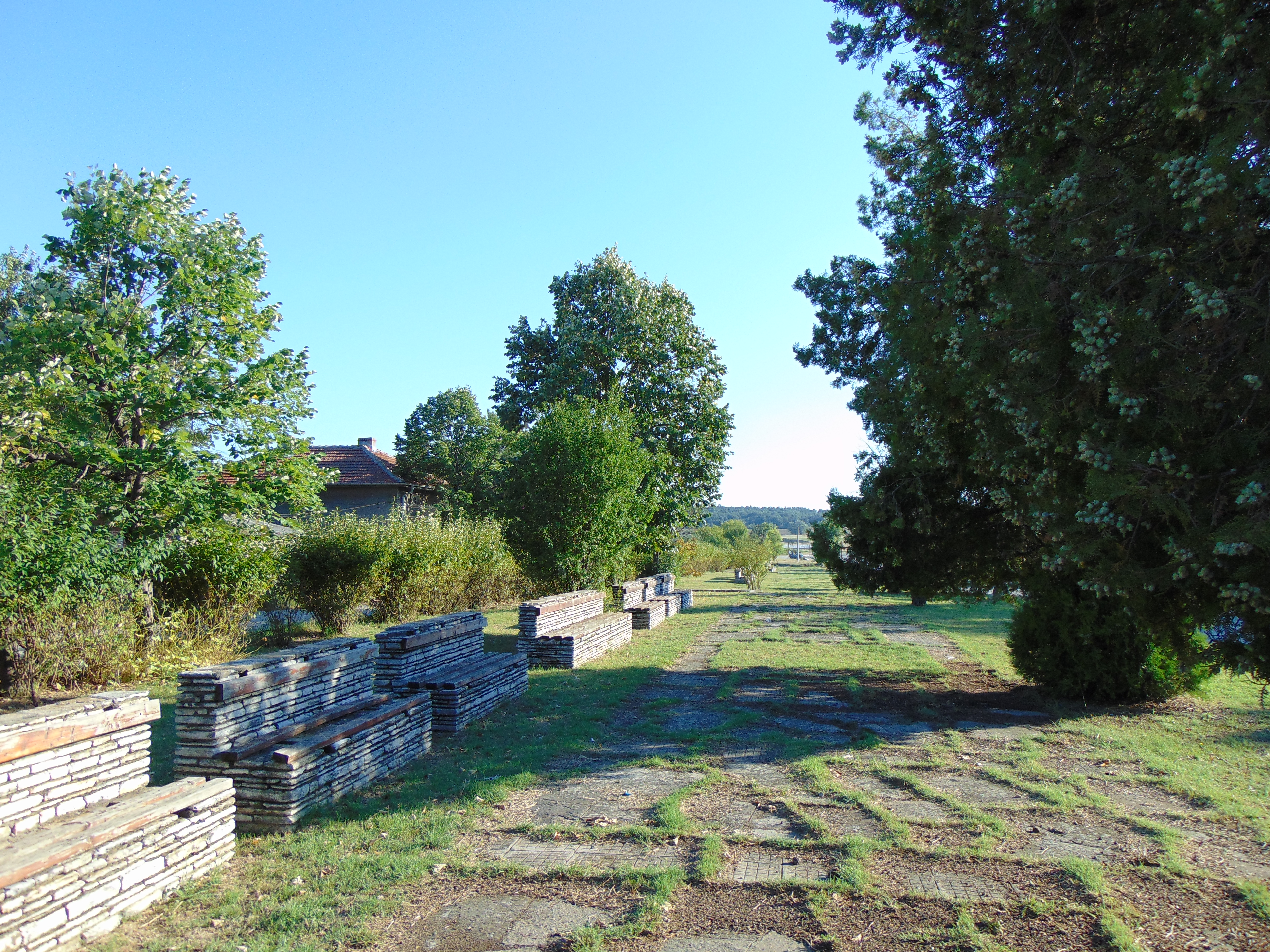 Място на Узунджовския панаир от XVI-XIX в.